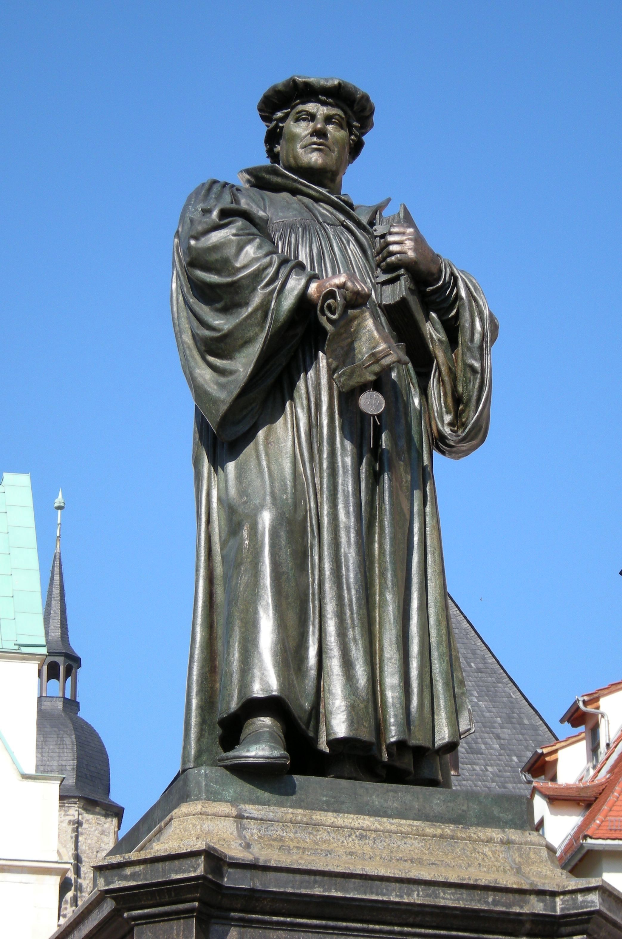 Eisleben - Luther-Statue.jpg